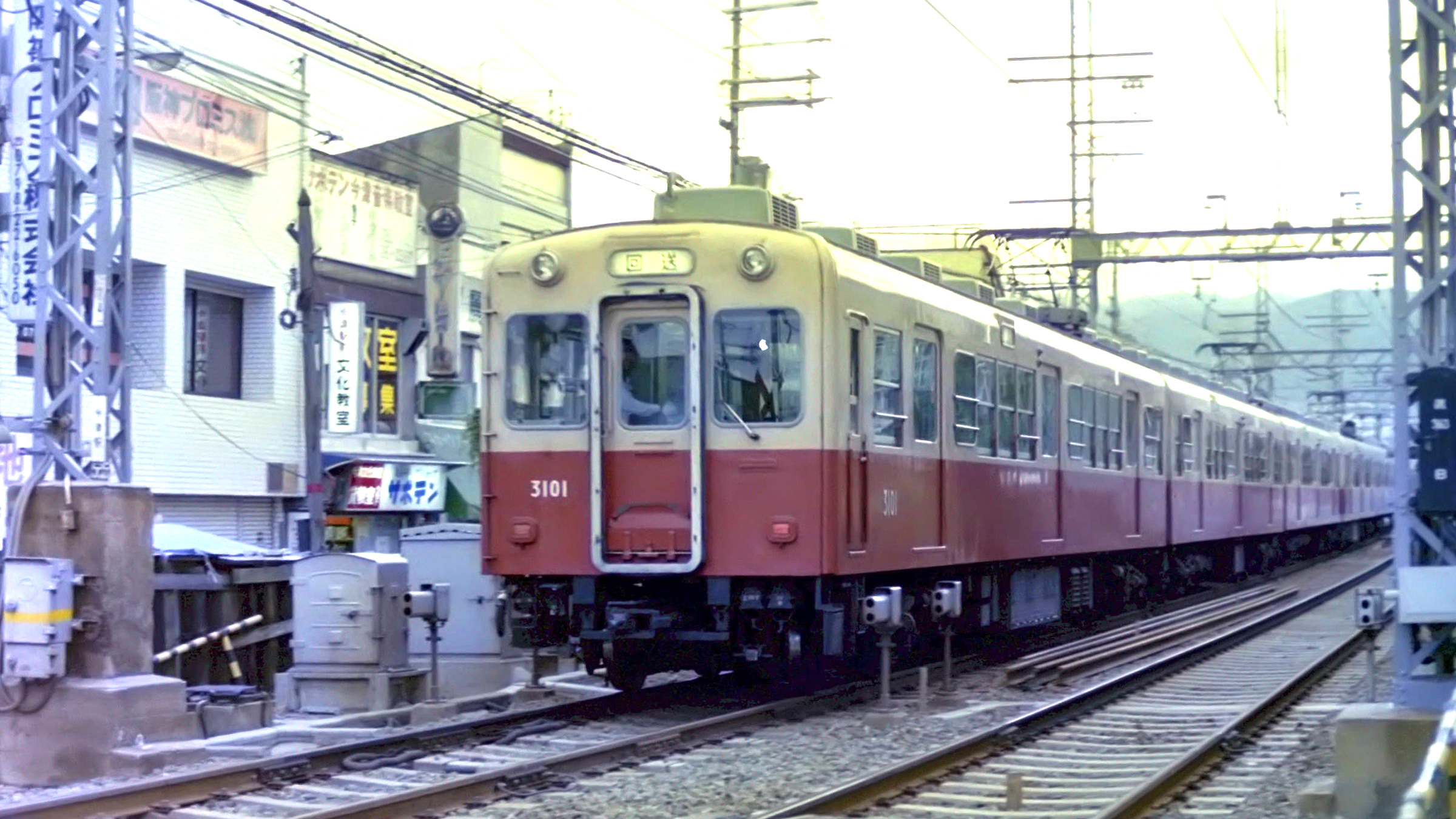 阪神電気鉄道3101 1985年 今津駅付近